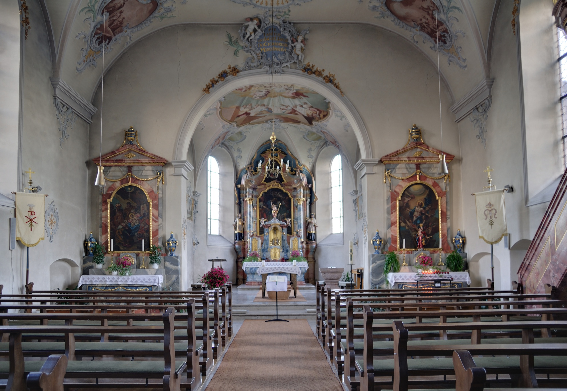 Rheinfelden-Minseln: St. Peter und Paul, Langhaus